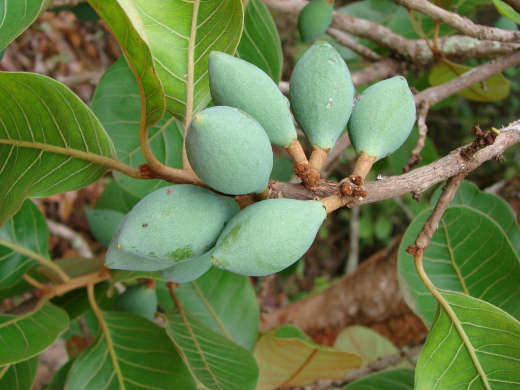 Pouteria ramiflora (Mart.) Radlk. - SAPOTACEAE - Jardim Botânico de Brasília - Distrito Federal - Brasil.